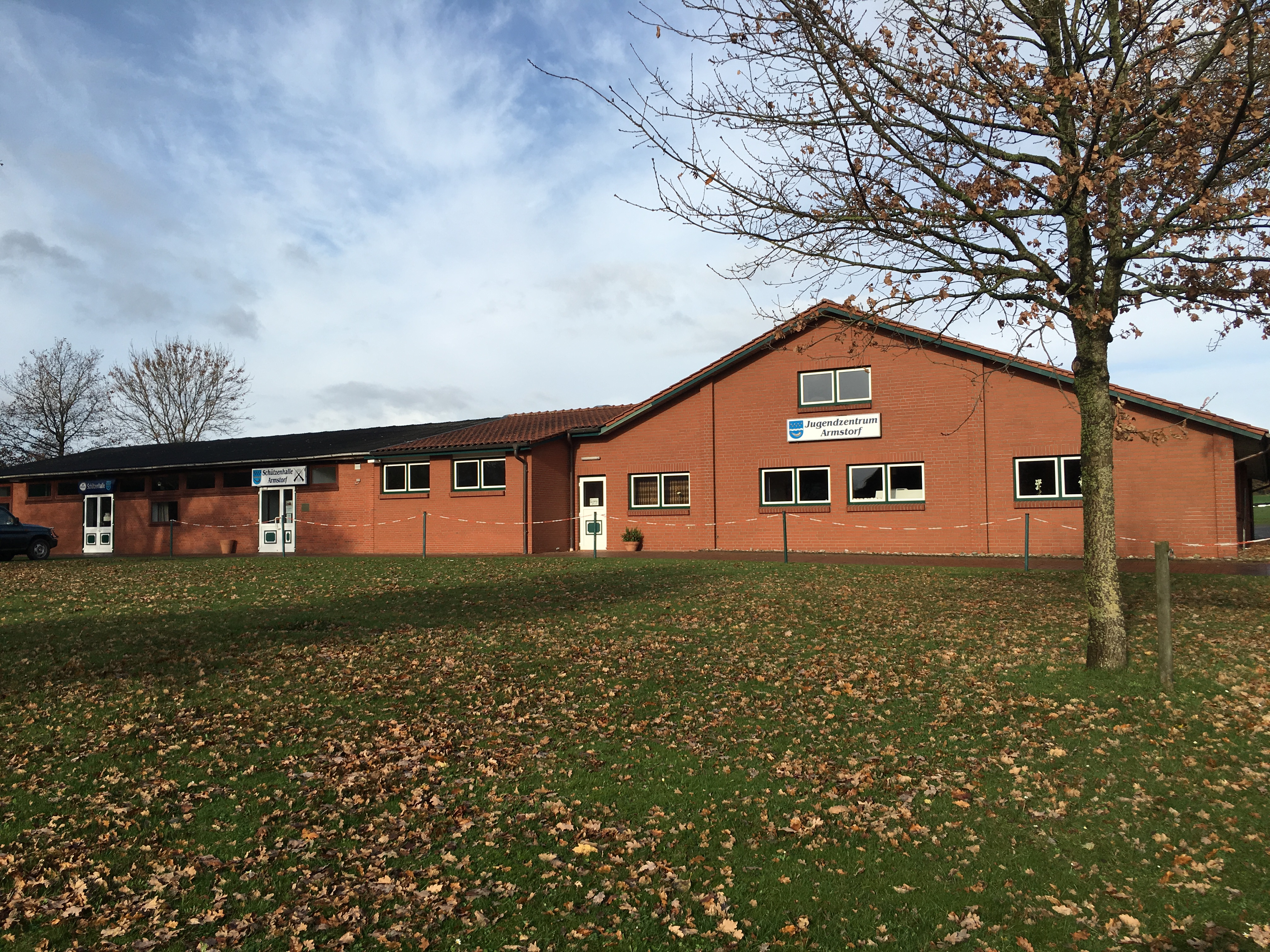 Schüttenhall un Jugendzentrum Armsdörp